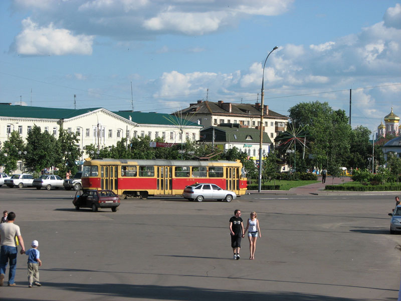 Трамвай в Орле